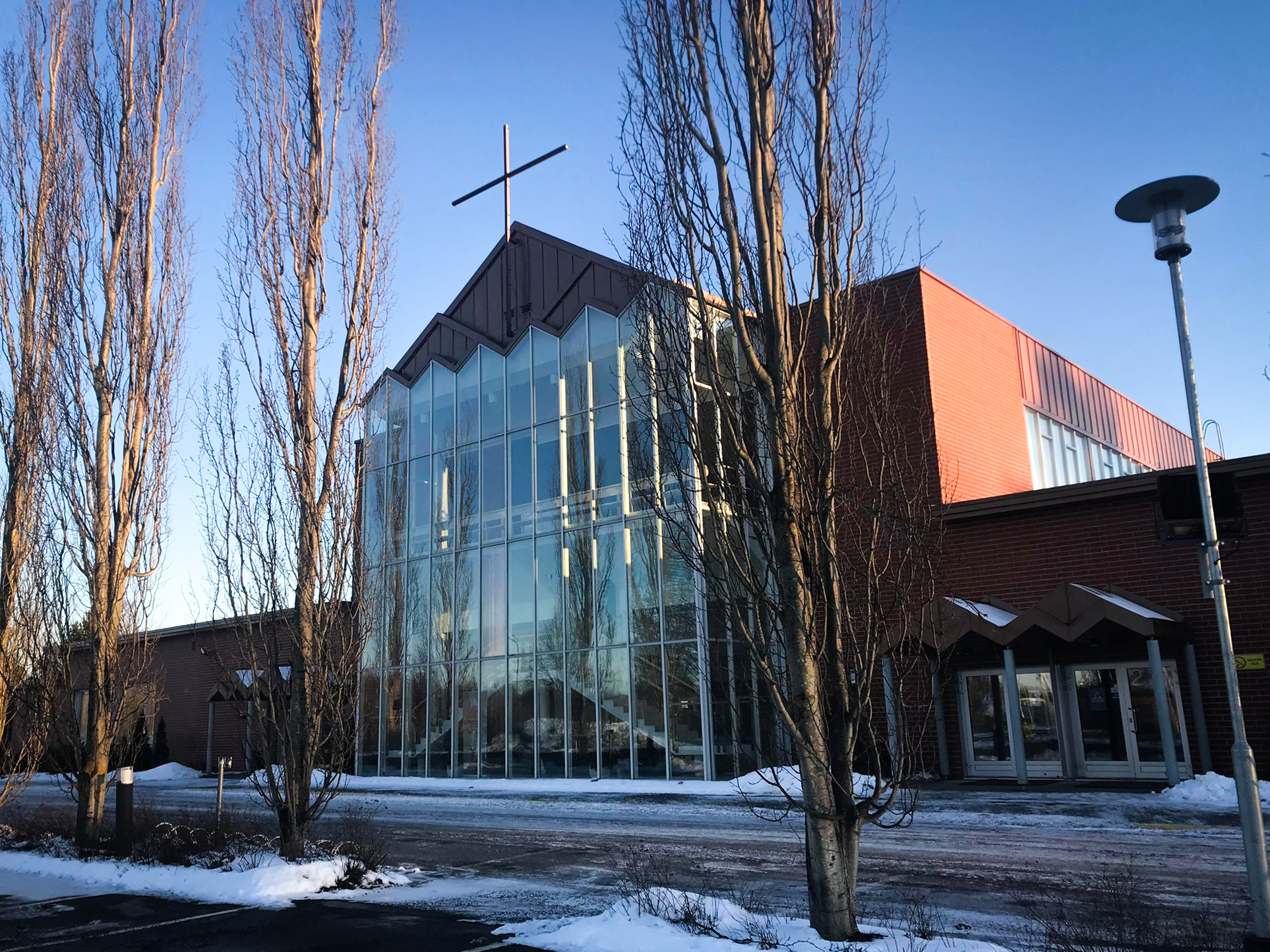 Seinäjoki Pentecostal Church at January 2020.